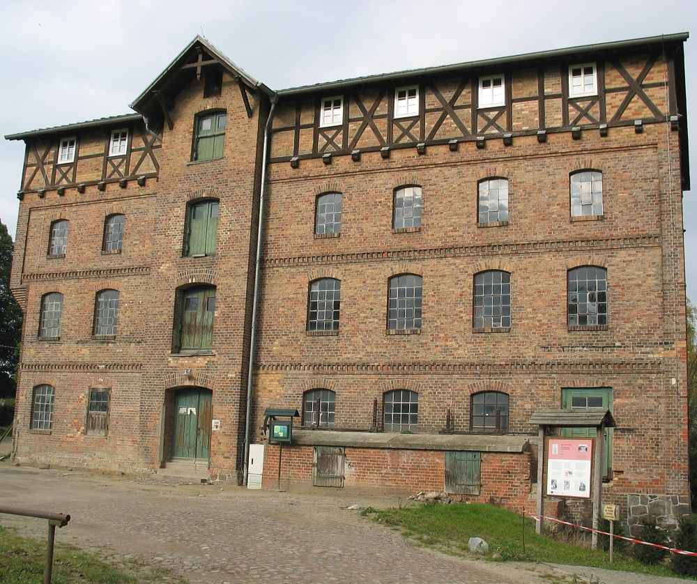 Gielower Mühle